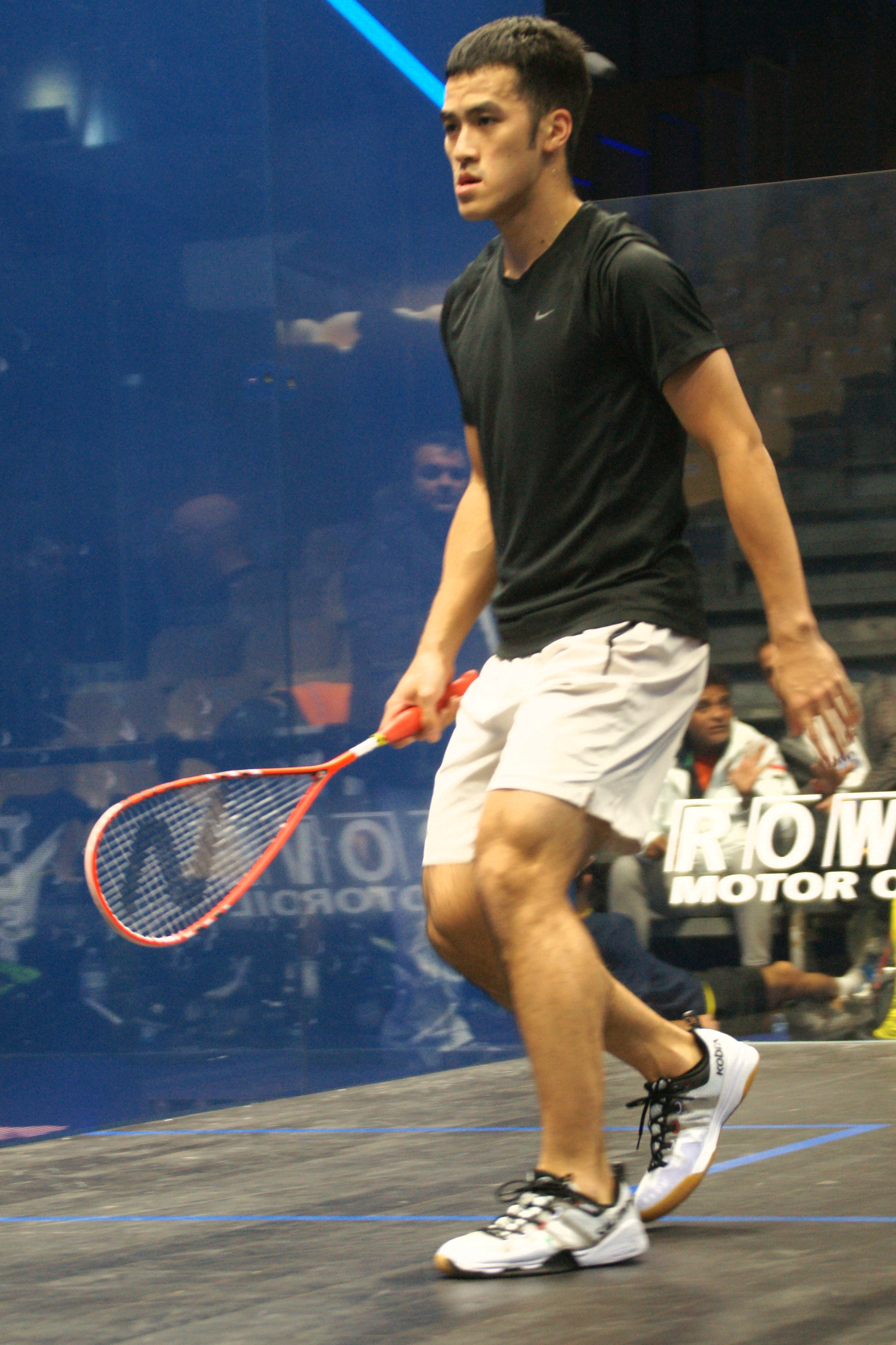 championnats du monde de squash par équipe Marseille 2017